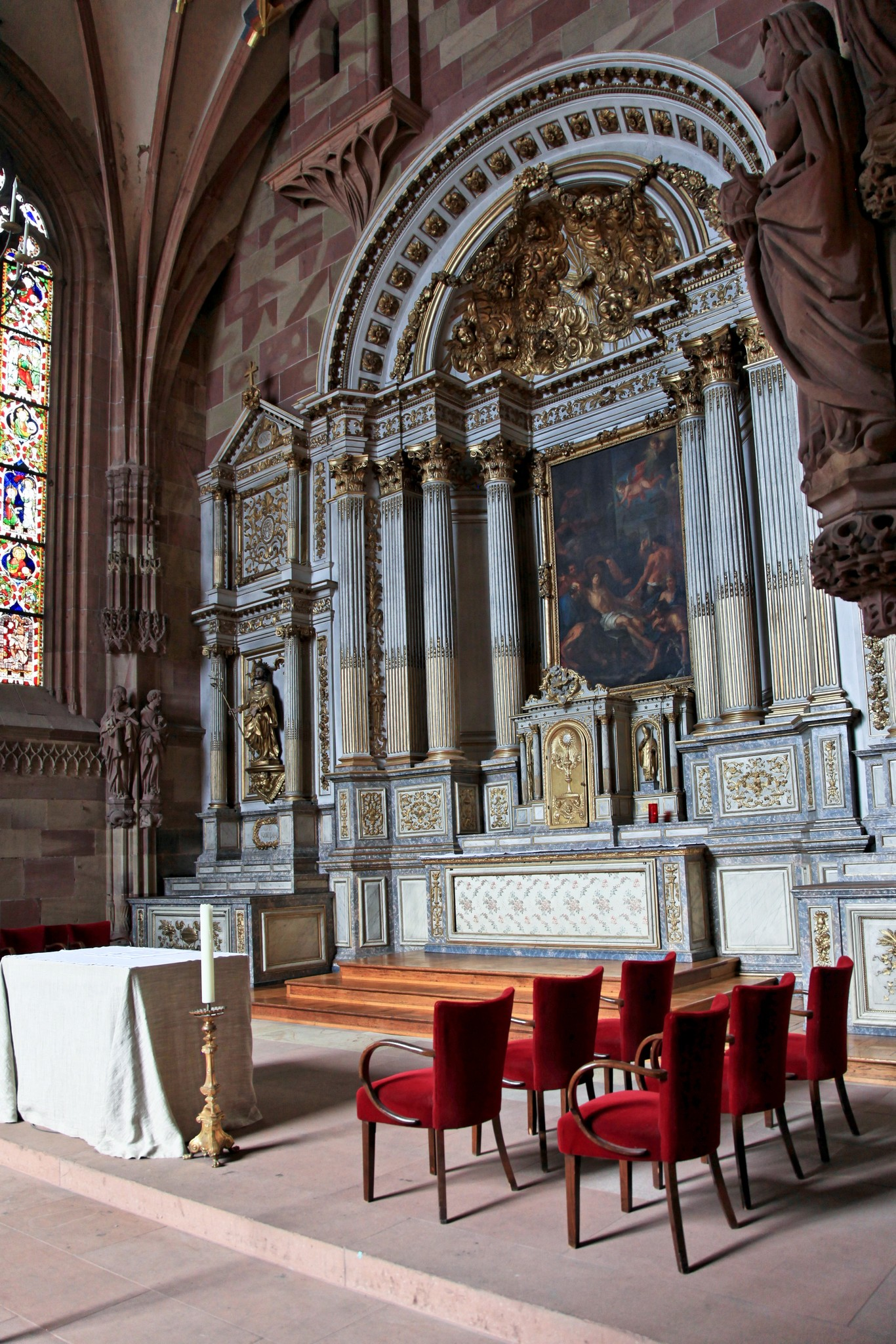 alors j'espère que ces 10 photos de l'intérieur de la cathédrale vous aideront à vous faire votre propre opinion.